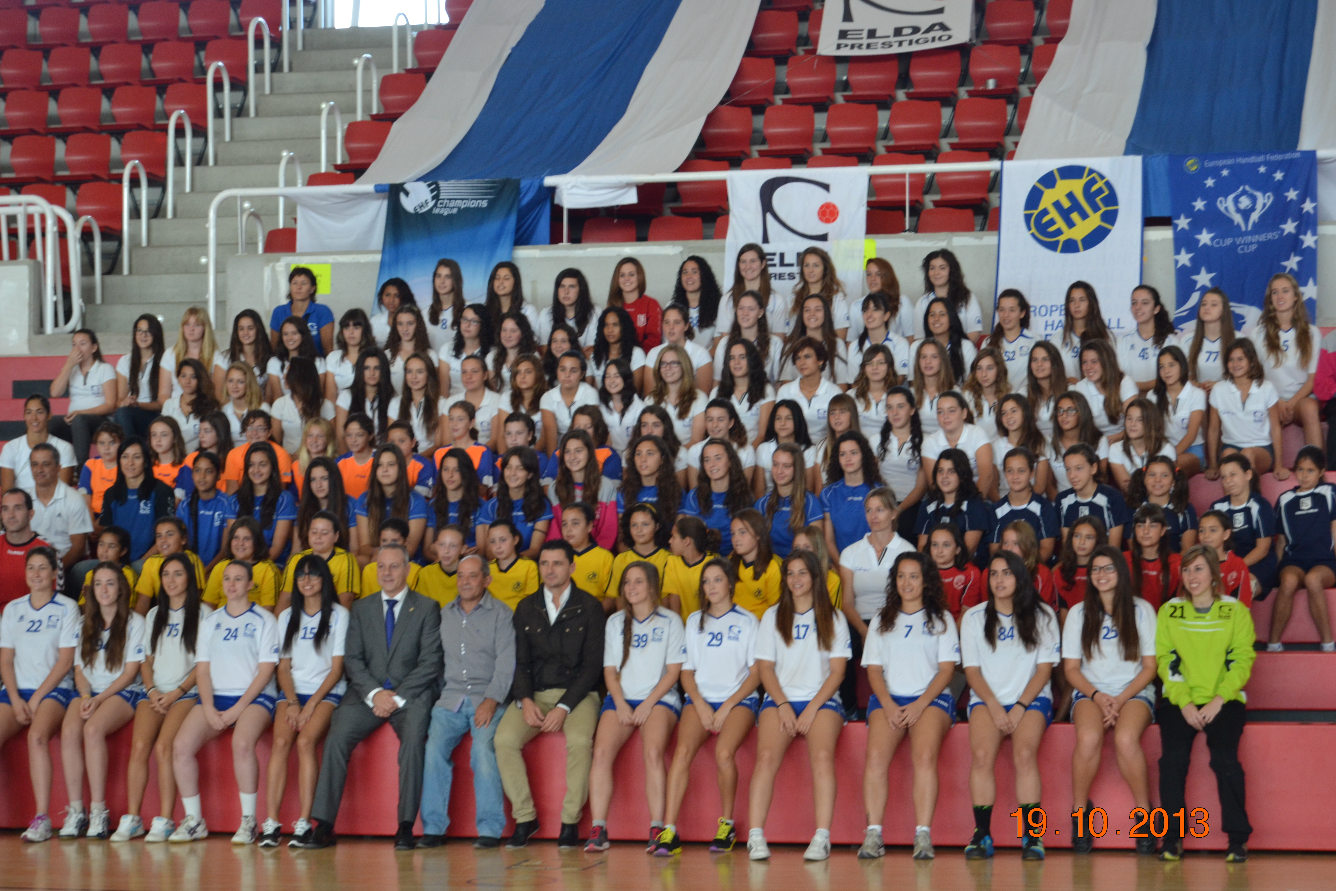 Presentacion temporada 2013/2014